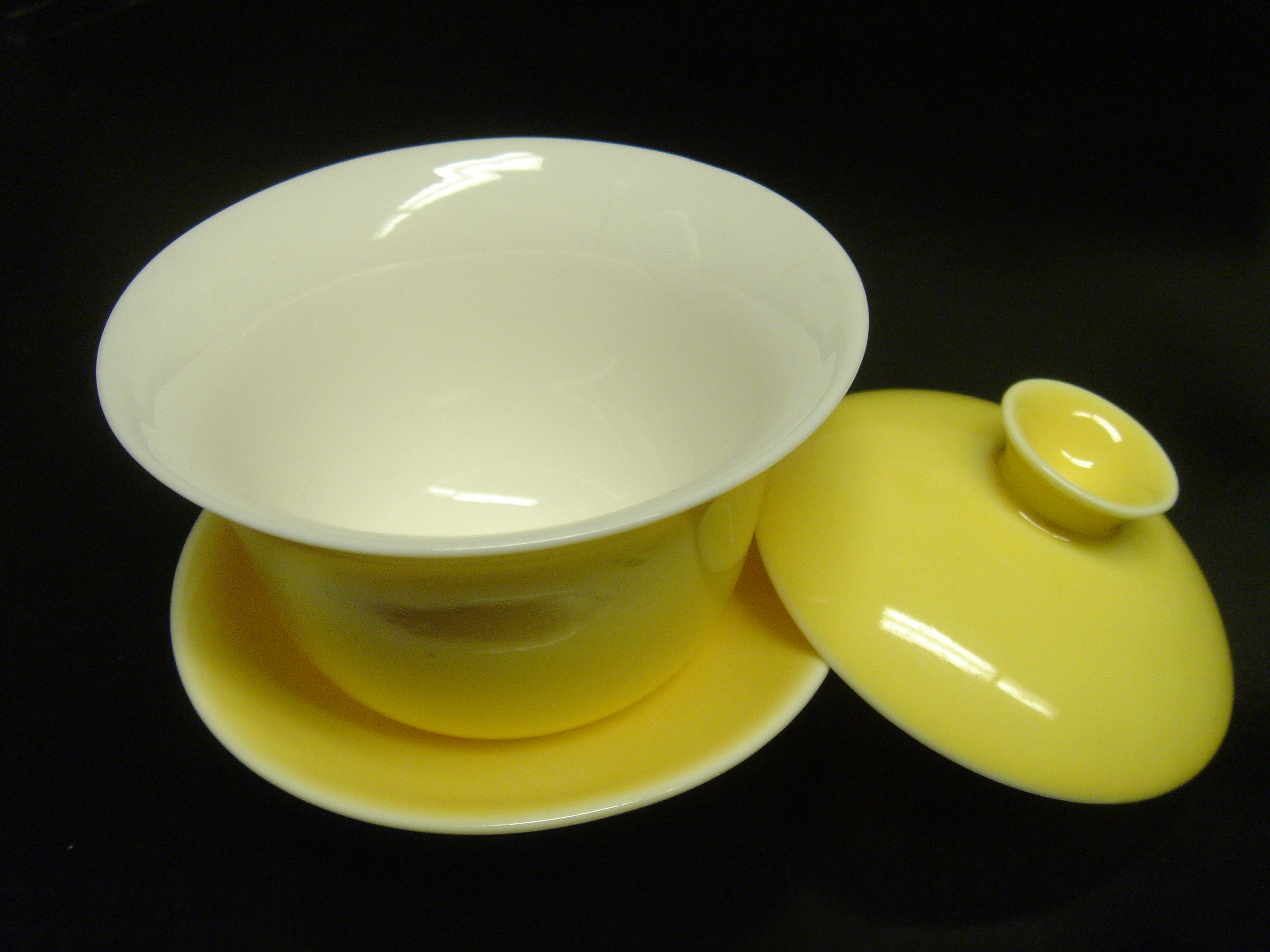 A Yellow porcelian gaiwan with lid off